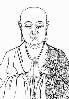 Ananda discepolo e cugino del Buddha Shakyamuni nonché II patriarca nei lignaggi del Buddhismo Tiantai e Chan, in una antica stampa cinese.